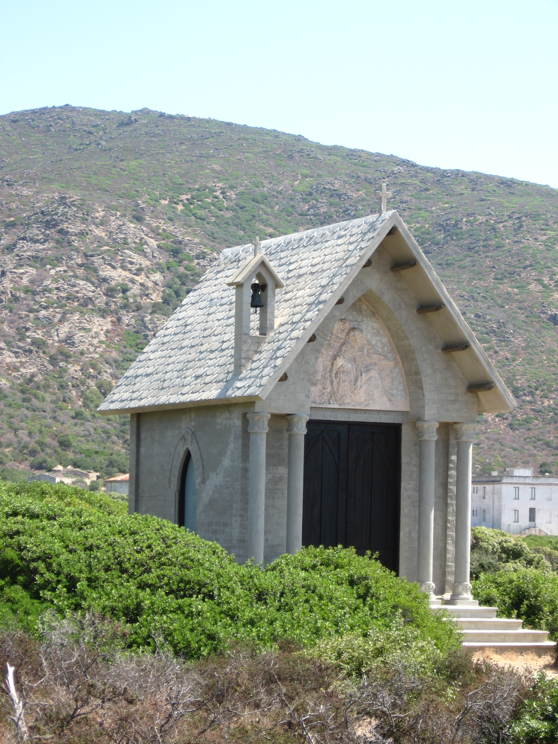 Cappella austriaca nell'isola dell'Asinara